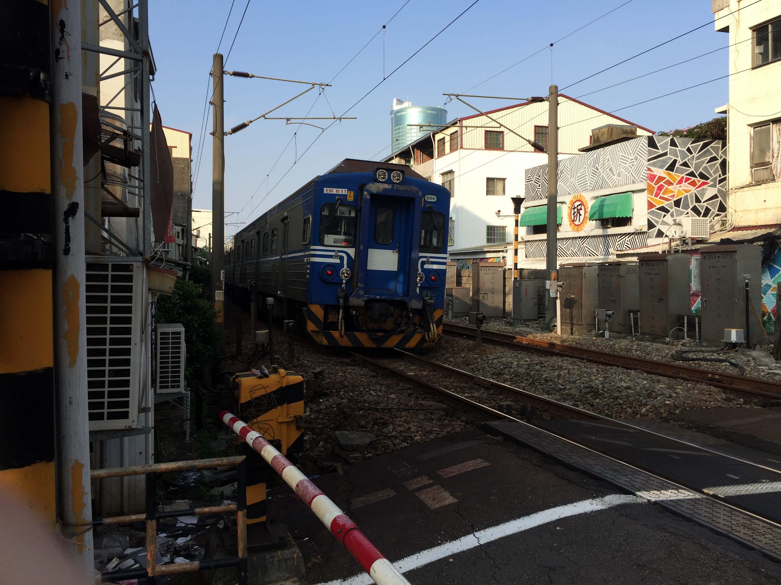 臺灣鐵路管理局電聯車EM611行經臺南市青年路平交道。照片中「反拆遷」標示，是因住戶不願配合臺南市區鐵路地下化計畫而遷移並讓出土地，所表達的決心。